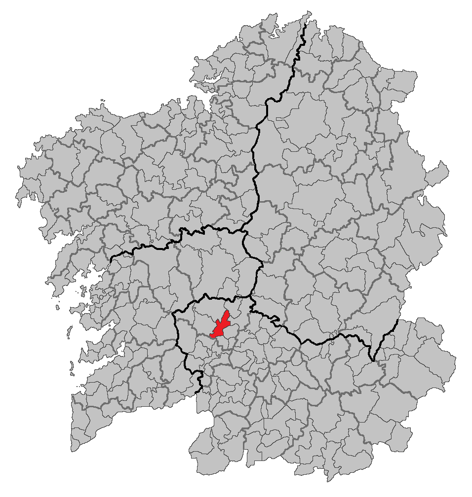 Mapa coa localización do concello de O Carballiño.